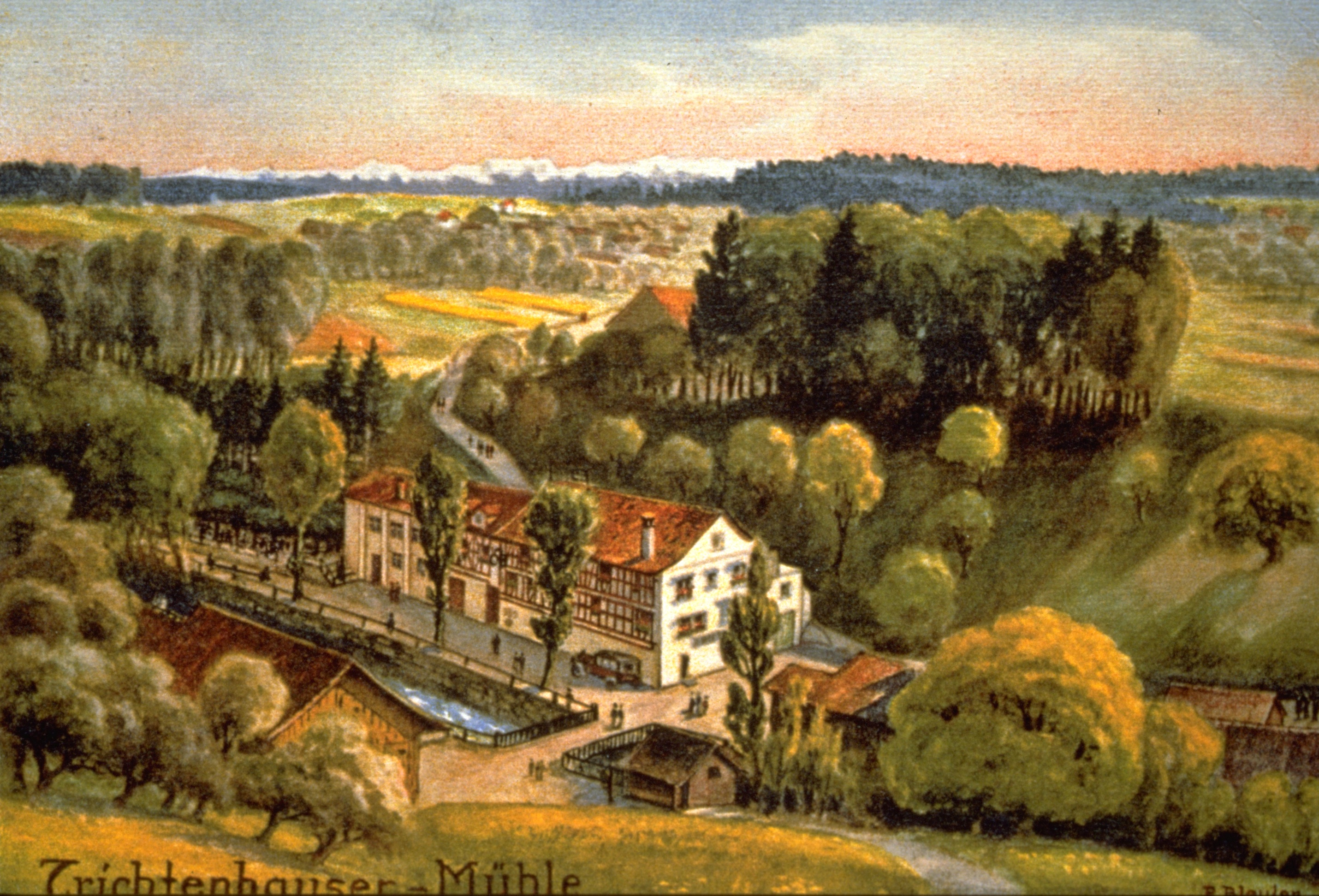 Mühle Trichtenhausen 1890